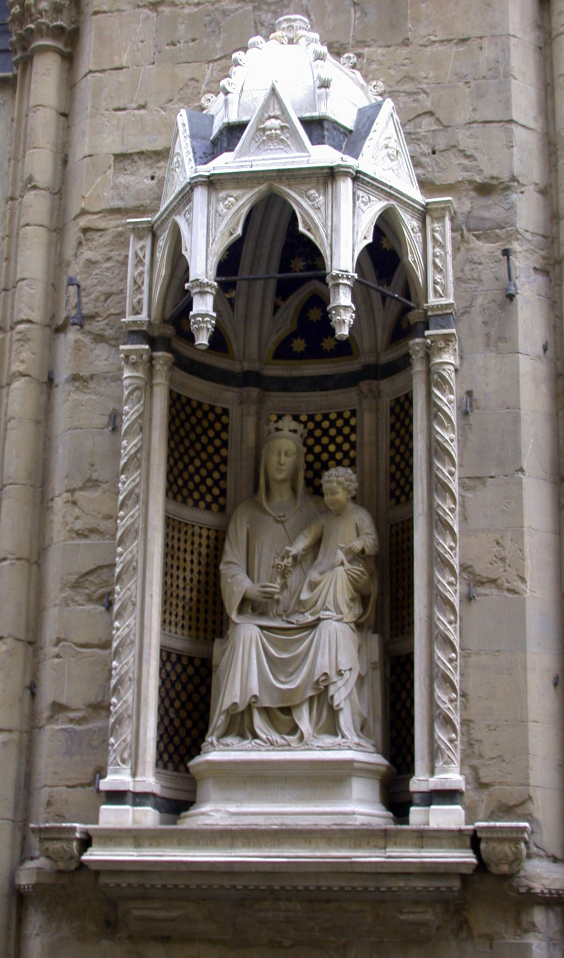 Firenze, Orsanmichele, Tabernacolo dell'arte dei Medici e Speziali, con Madonna della Rosa di Simone di Ferrucci. Foto personale aprile 2005.